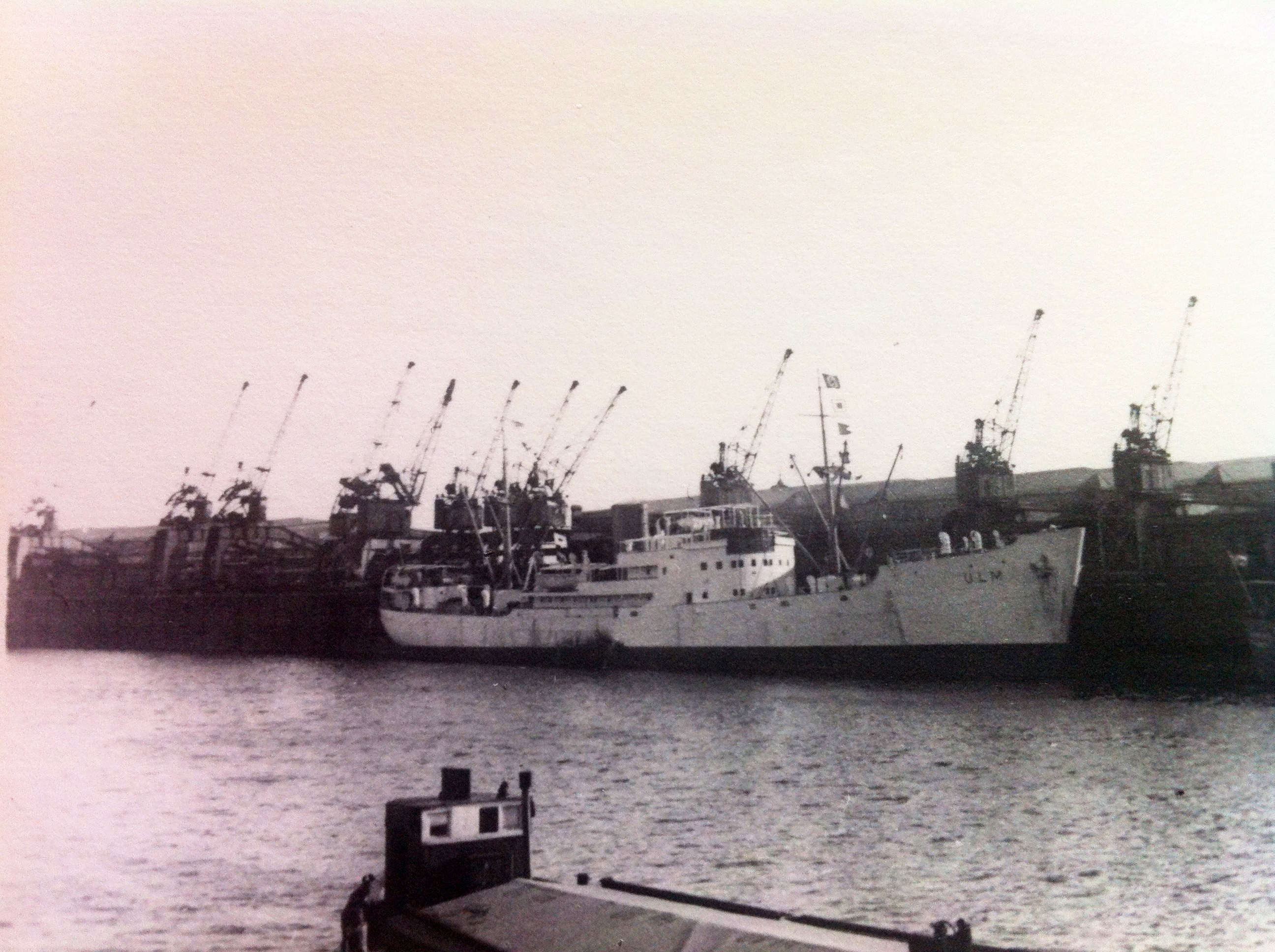 aus Privatbesitz